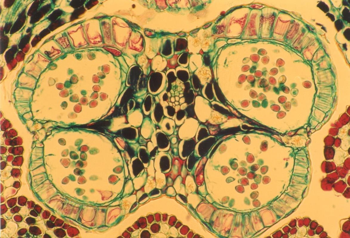 Saco polínico en una angiosperma.